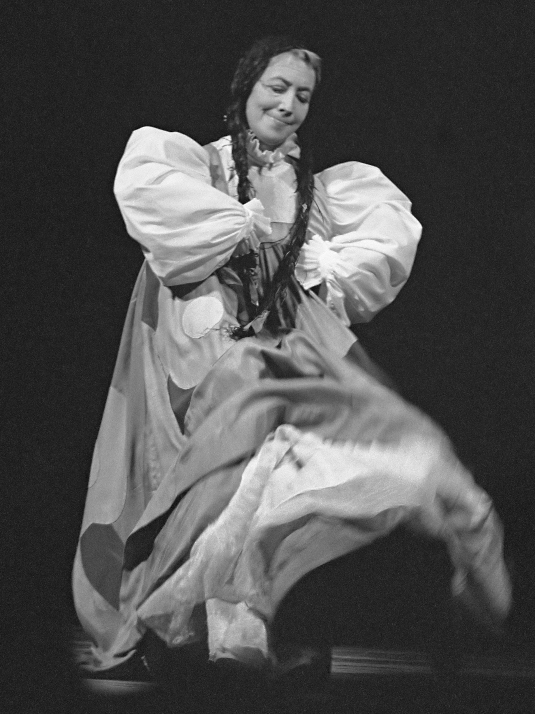 Premiere "De Wereld" van Cilli Wang. Cilli Wang als Russisch danseresje 20 oktober 1961